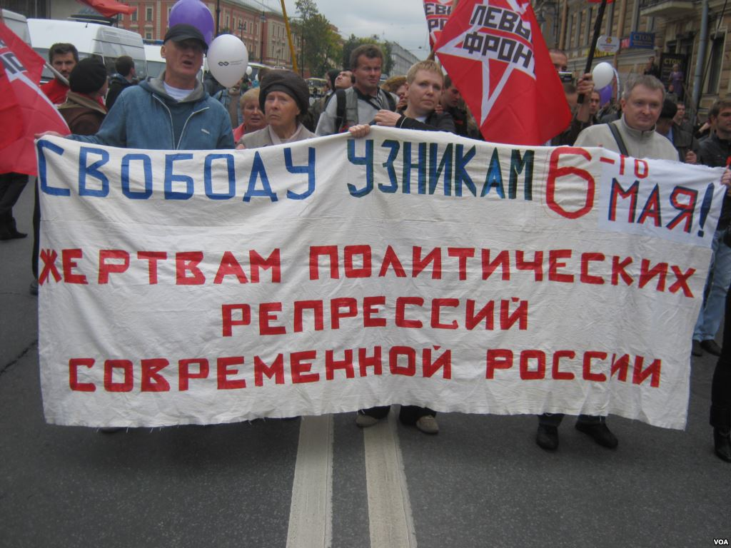 Демонстрация в Петербурге в поддержку узников 6 мая.